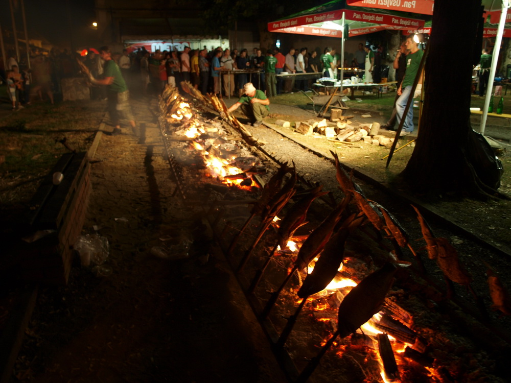 Riblje večeri u naselju Davor u Brodsko-posavskoj županiji.